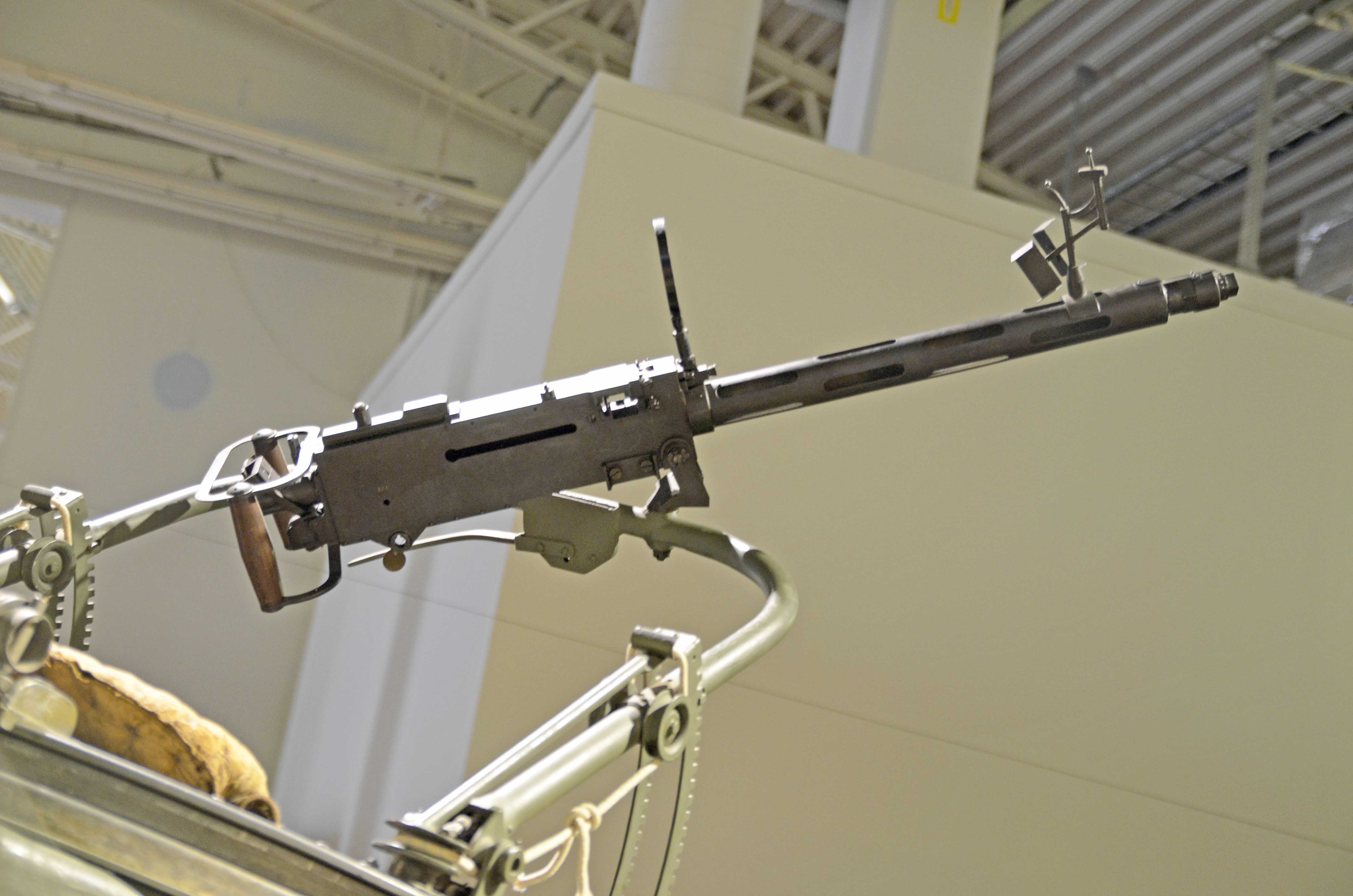 Rörliga varianten som benämndes Ksp m/22R. Vapnet utrustades med ett speciellt sikte på pipan som fungerade som en flöjel så att skytten lättare skulle kunna följa sitt mål.